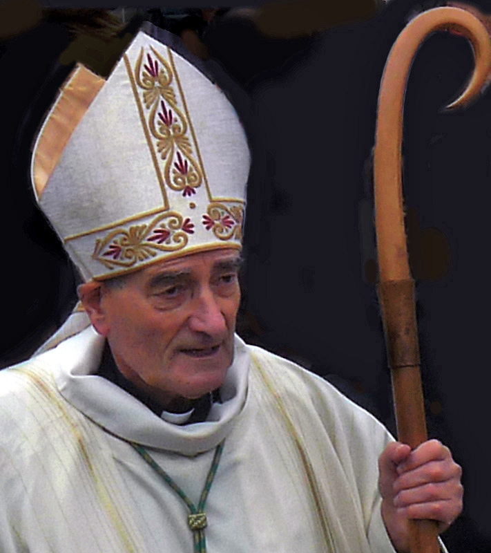 Archevêque d'Aix, monseigneur Christophe Dufour, au pèlerinage des Saintes-Maries-de-la-mer en octobre 2016